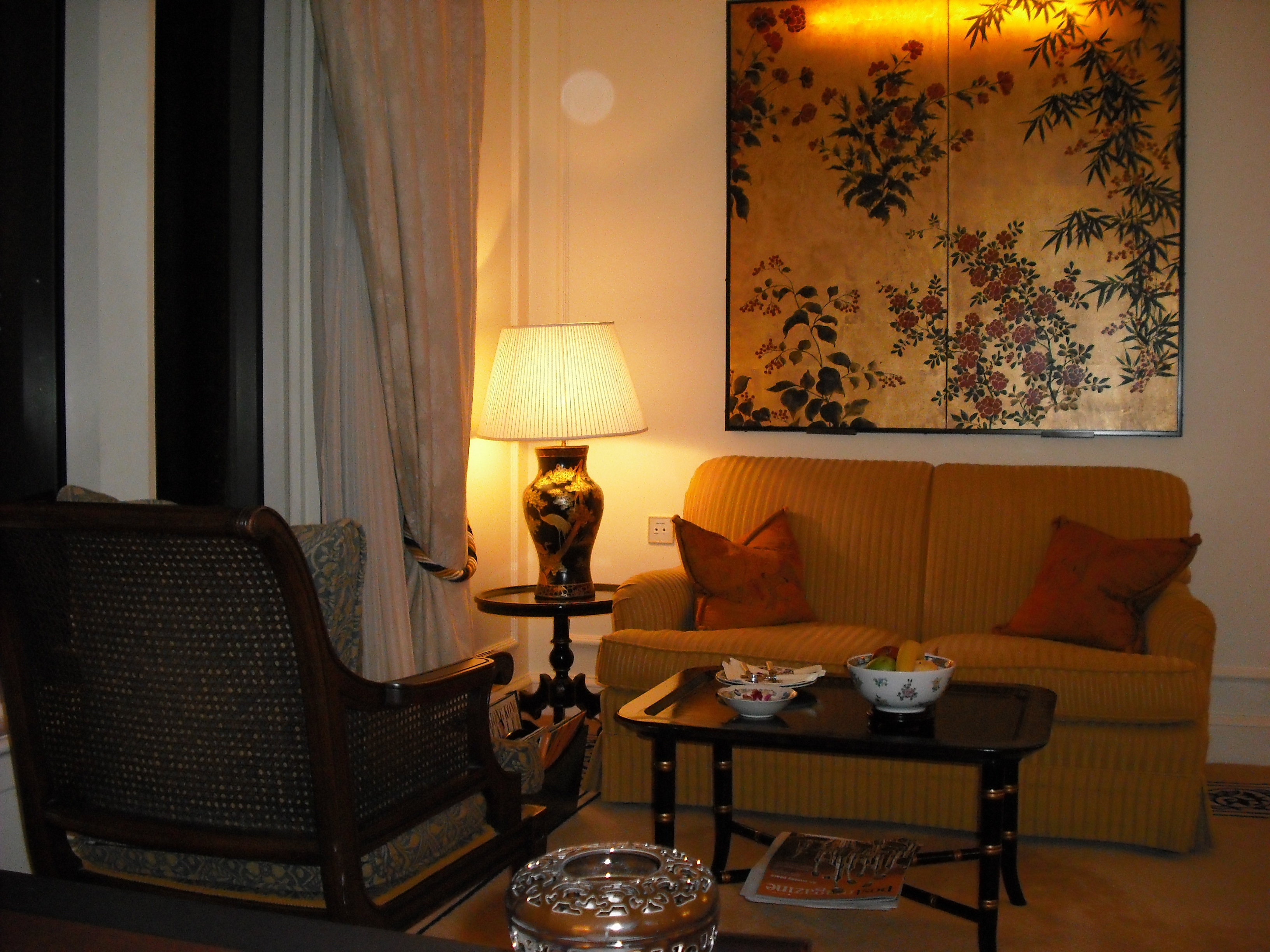 Guestroom, Peninsula Hong Kong